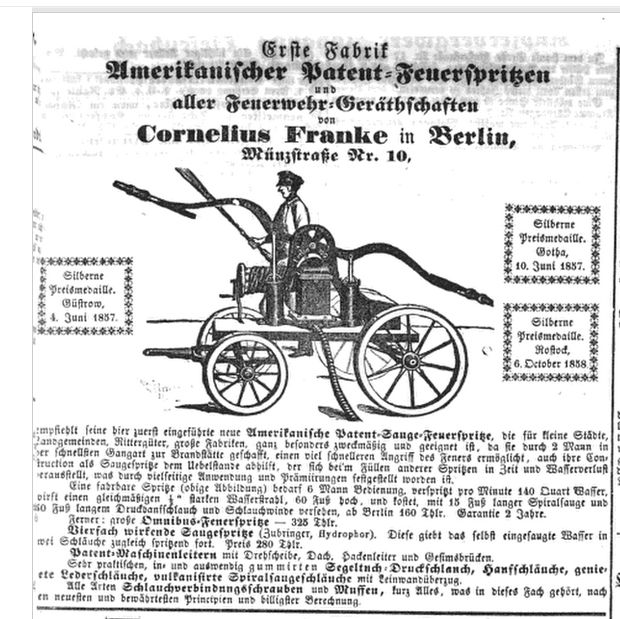 Anzeige von Cornelius Franke, Berlin, des Herstellers von Feuerspritzen nach amerikanischem Muster aus dem Jahr 1859 in der Magdeburgischen Zeitung (Link zur Anzeige in der Magdeburgischen Zeitung)